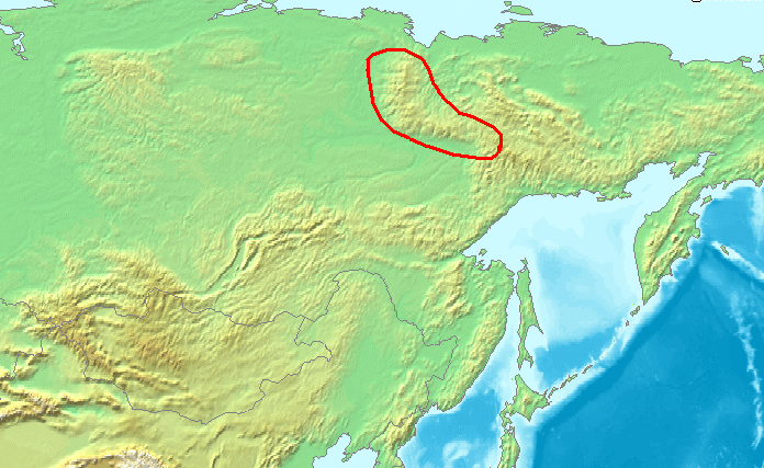 Location Verkhoyansk Range.PNG